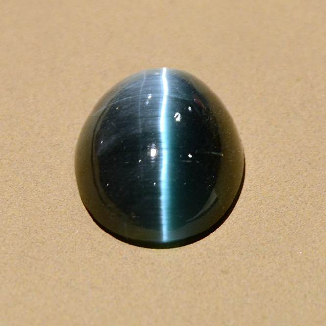 Tourmaline oeil-de-chat. Edelsteinmuseum, Idar-Oberstein.